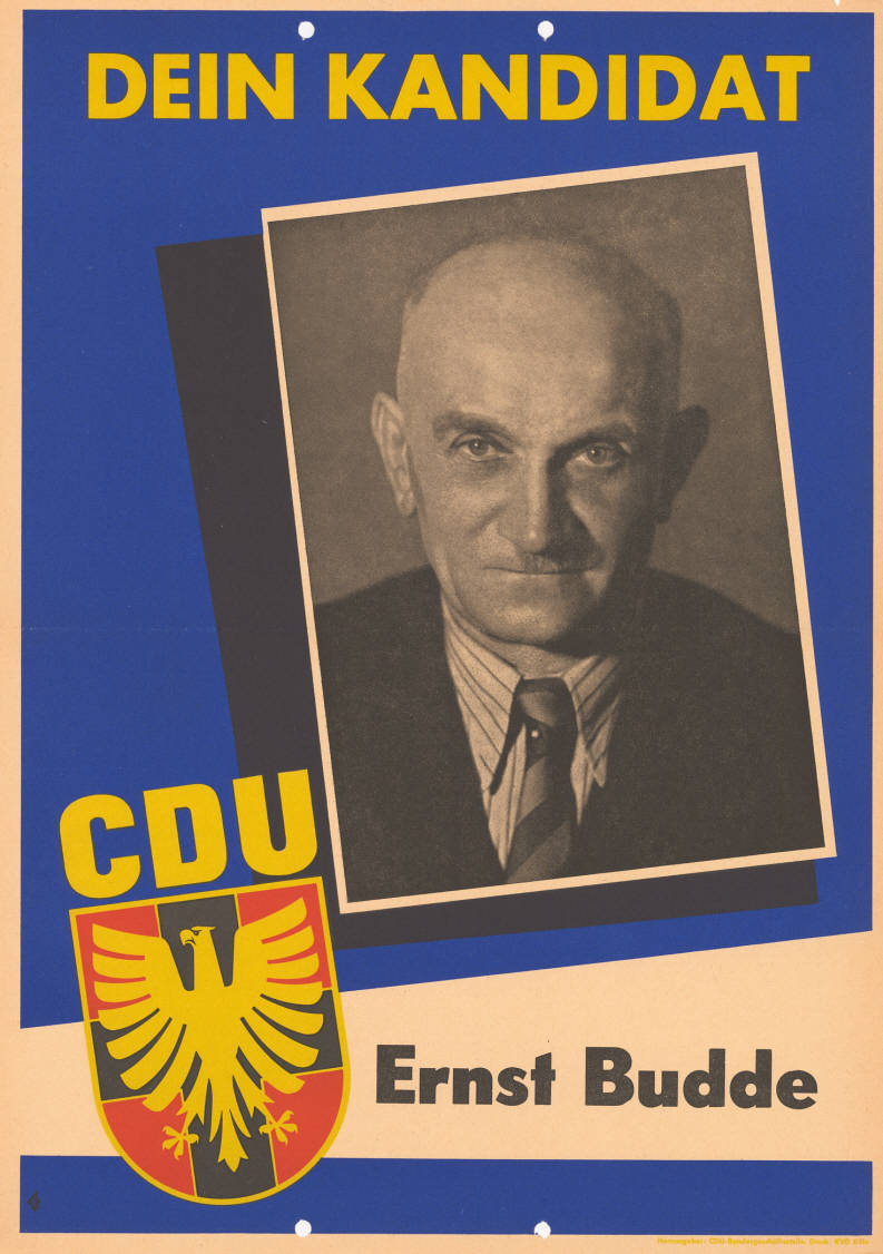 Dein Kandidat CDU Ernst Budde Abbildung: Porträtfoto - CDU-Logo Plakatart: Kandidaten-/Personenplakat mit Porträt Auftraggeber: CDU-Bundesgeschäftsstelle Drucker_Druckart_Druckort: KVD, Köln Objekt-Signatur: 10-009 : 298 Bestand: Landtagswahlplakate Nordrhein-Westfalen (10-009) GliederungBestand10-18: Landtagswahlplakate Nordrhein-Westfalen (10-009) » Landtagswahl am 27.6.1954 » CDU » mit Porträt-Foto Lizenz: KAS/ACDP 10-009 : 298 CC-BY-SA 3.0 DE